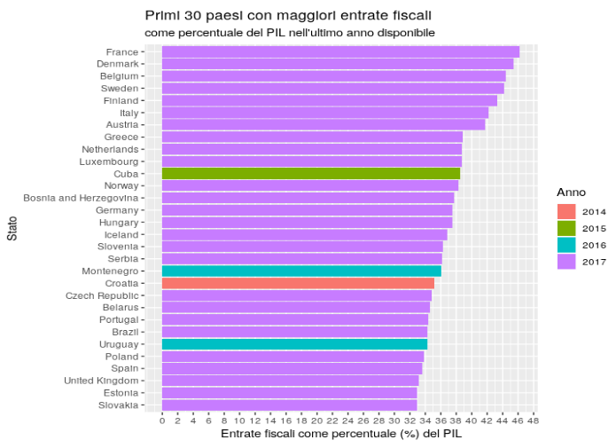 file realizzato con RStudio con i seguenti dati